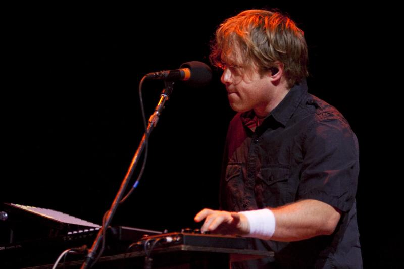 Korn Live @ Credicard Hall - 21/04/2010 - São Paulo, Brasil É proibida a cópia ou reprodução deste material sem a autorização do autor. Por favor, não publique nada daqui sem o devido crédito. Fotógrafo: Alexandre Cardoso